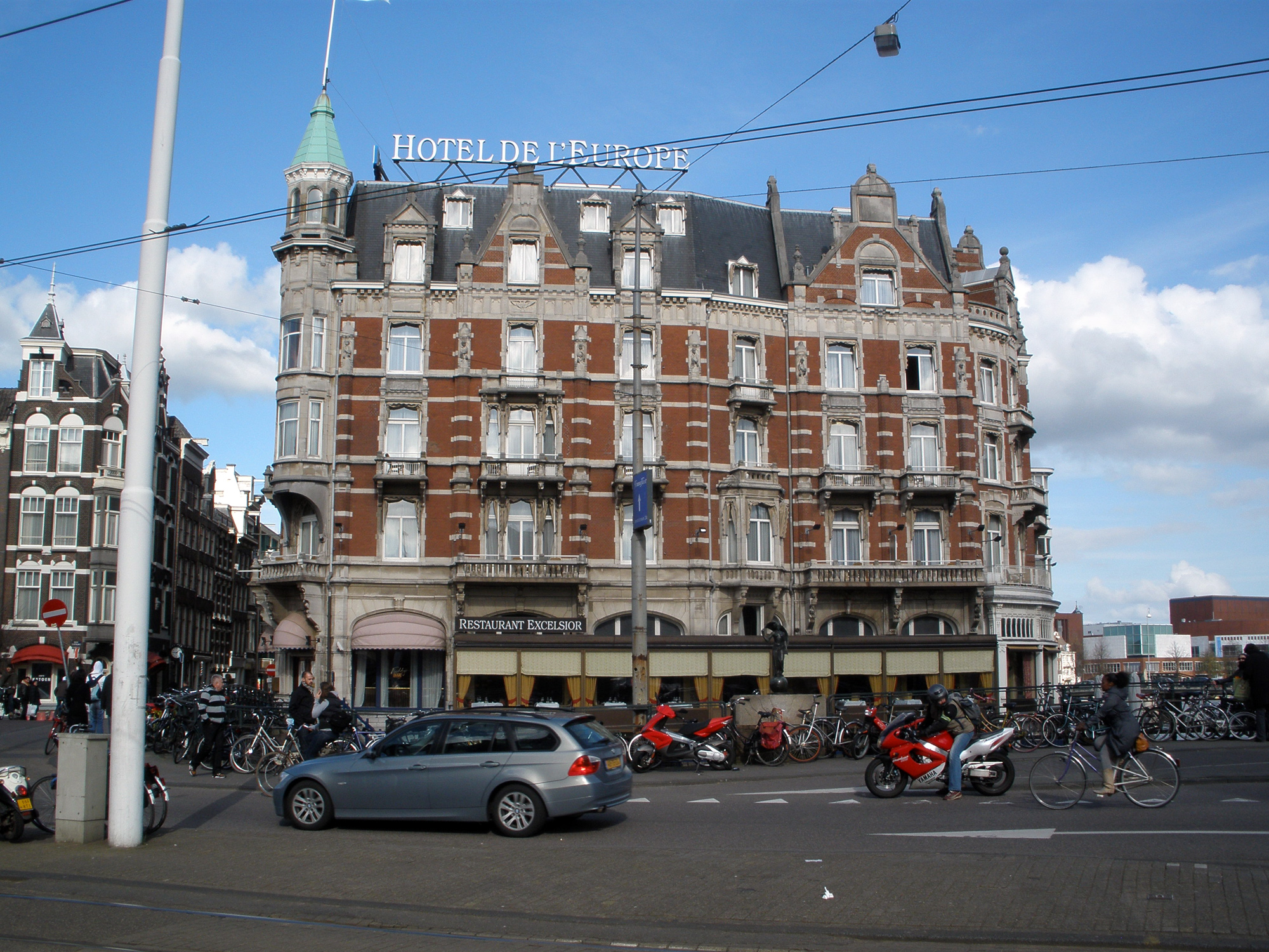 Hotel de l'Europe in Amsterdam, seen from the Rokin